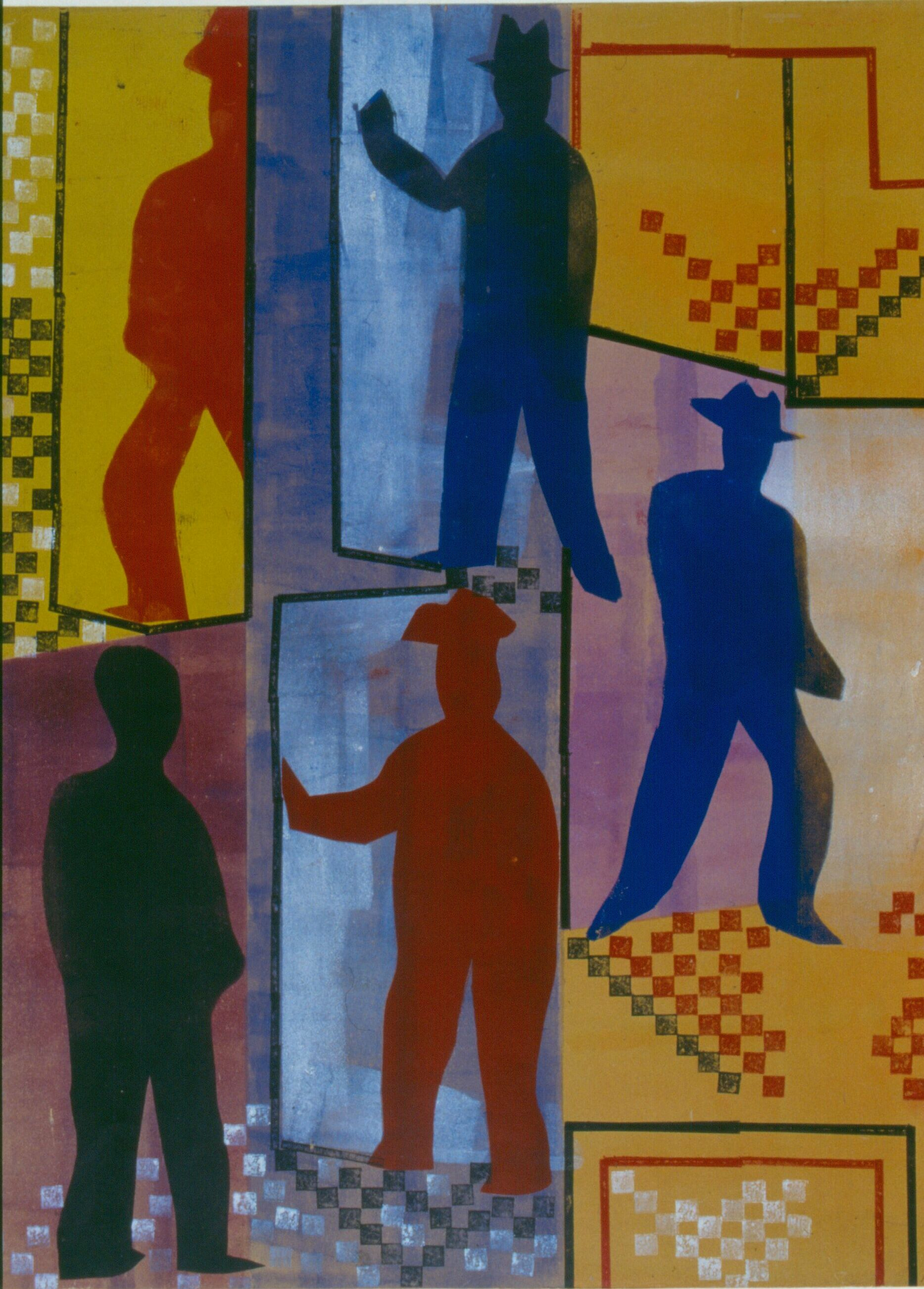 Hendrik Werkman Draaideur van het postkantoor 2 (1941) (Drehtür des Postamts 2; Groninger Museum).